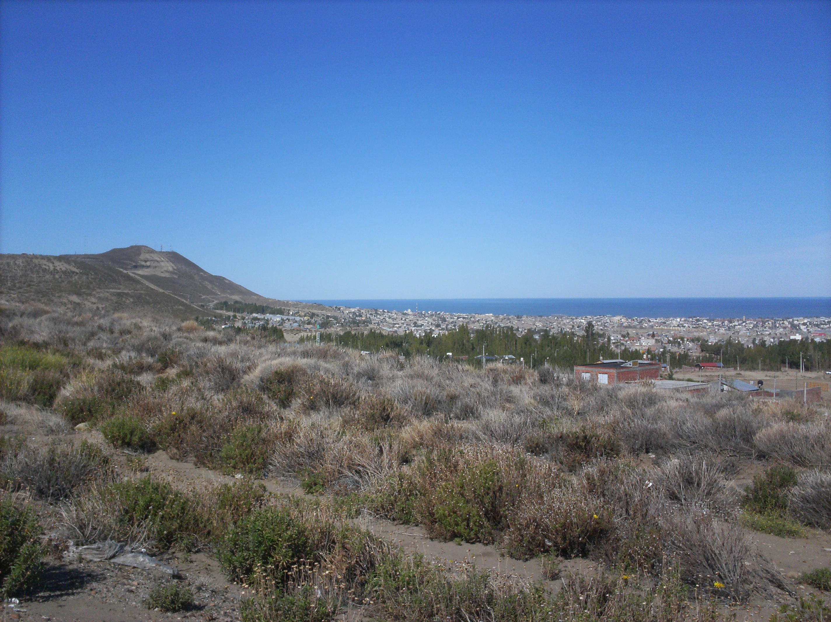 La ciudad de comodoro rivadavia en los margenes de la meseta patagonica, q toma el nombre de Cerro Chenque